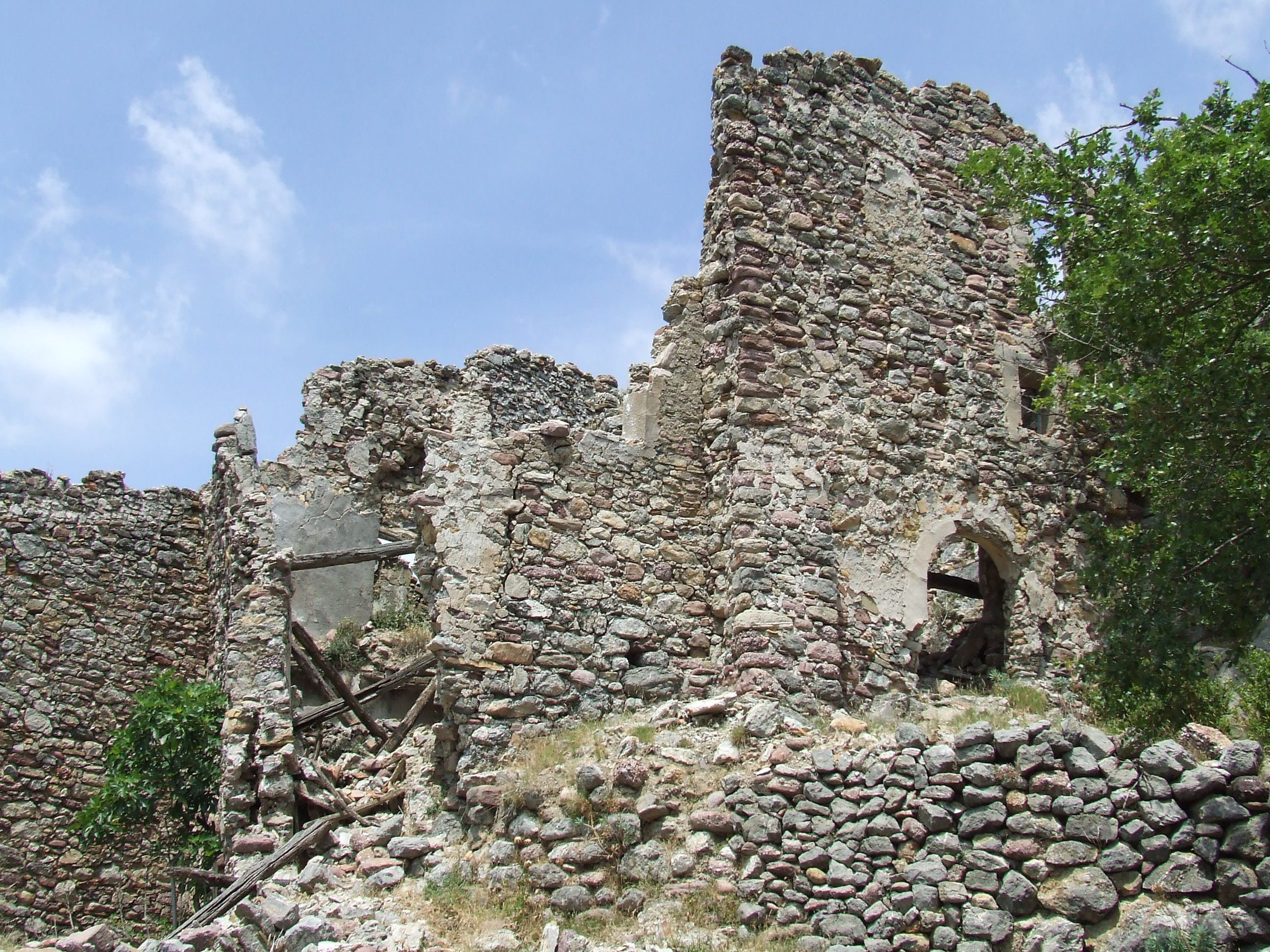 Casa senyorial de Puigcerver (potser el castell?) (Senterada, Pallars Jussà)